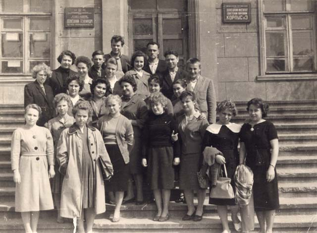 Первый выпуск Сталинского заочного химико-технологического техникума